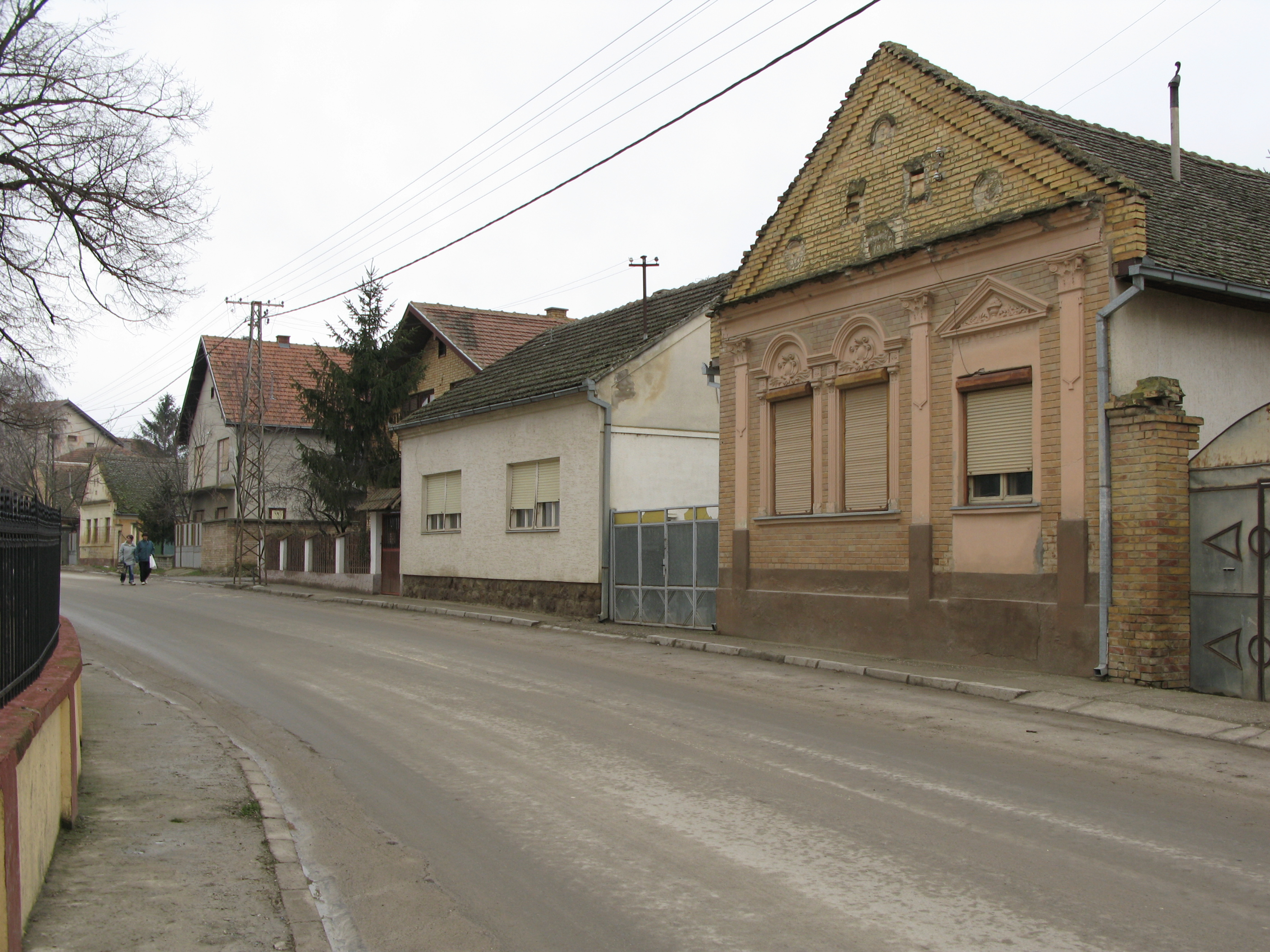 Main street in Susek, Vojvodina (Serbia)/Rue principale de Susek, Voïvodine(Serbie)